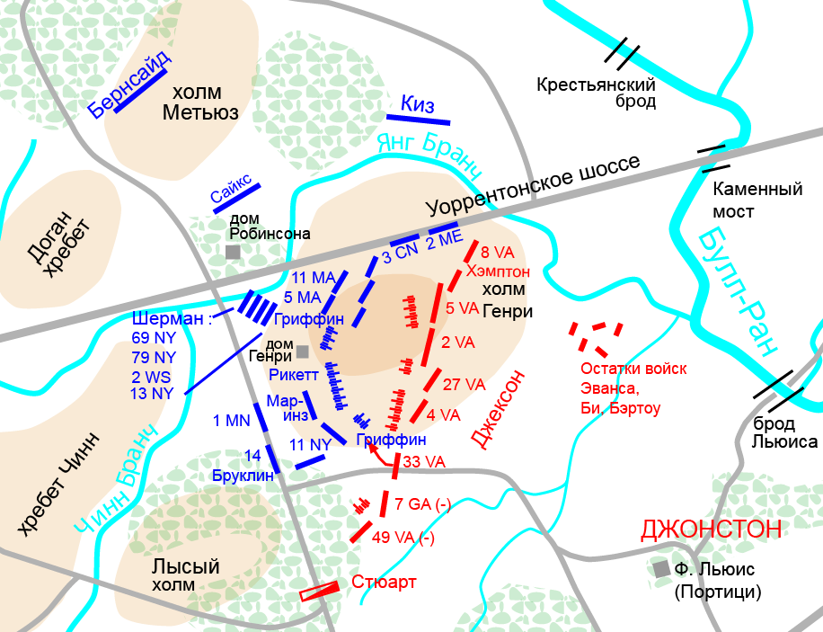 Русифицированная версия английской карты